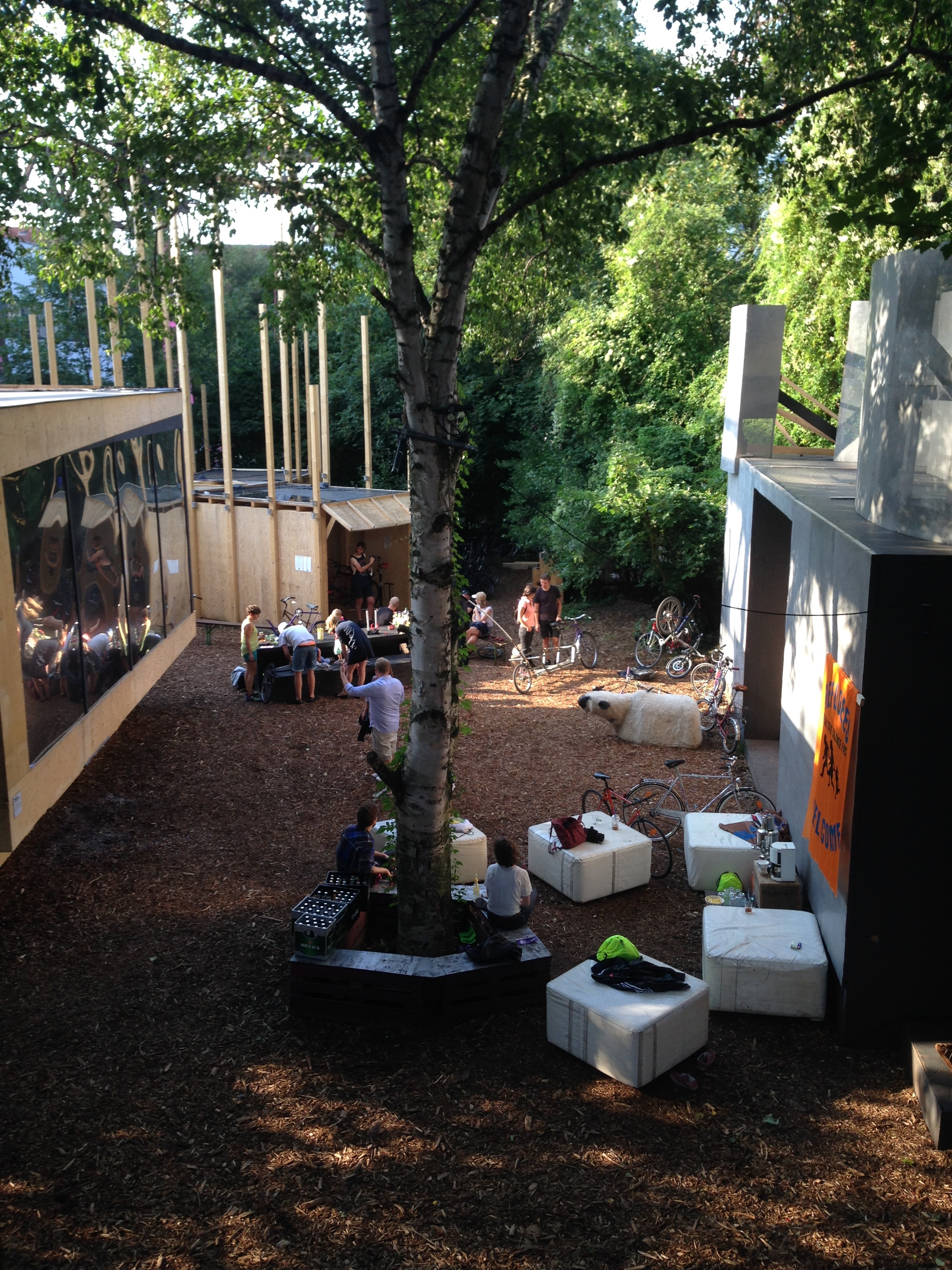 Gemeinsam mit Künstler*innen der Hamburger Kulturszene transformieren Baltic Raw die aktuelle Bausprache der Macht, zu sozialen Plastiken und alternativen Raumkonzepten. Den Burj Khalifa, Dubai verwandelt in Raum für Fahrradkultur von Radpropaganda; den Walt Disney Concert Hall, Los Angeles verwandelt in Migrations Welcome Hall; die Europäische Zentralbank verwandelt in das Haus der Darstellungskünste (Performancegruppe: JAJAJA).